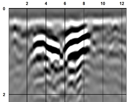 Выделение скрытых подземных пустот георадаром